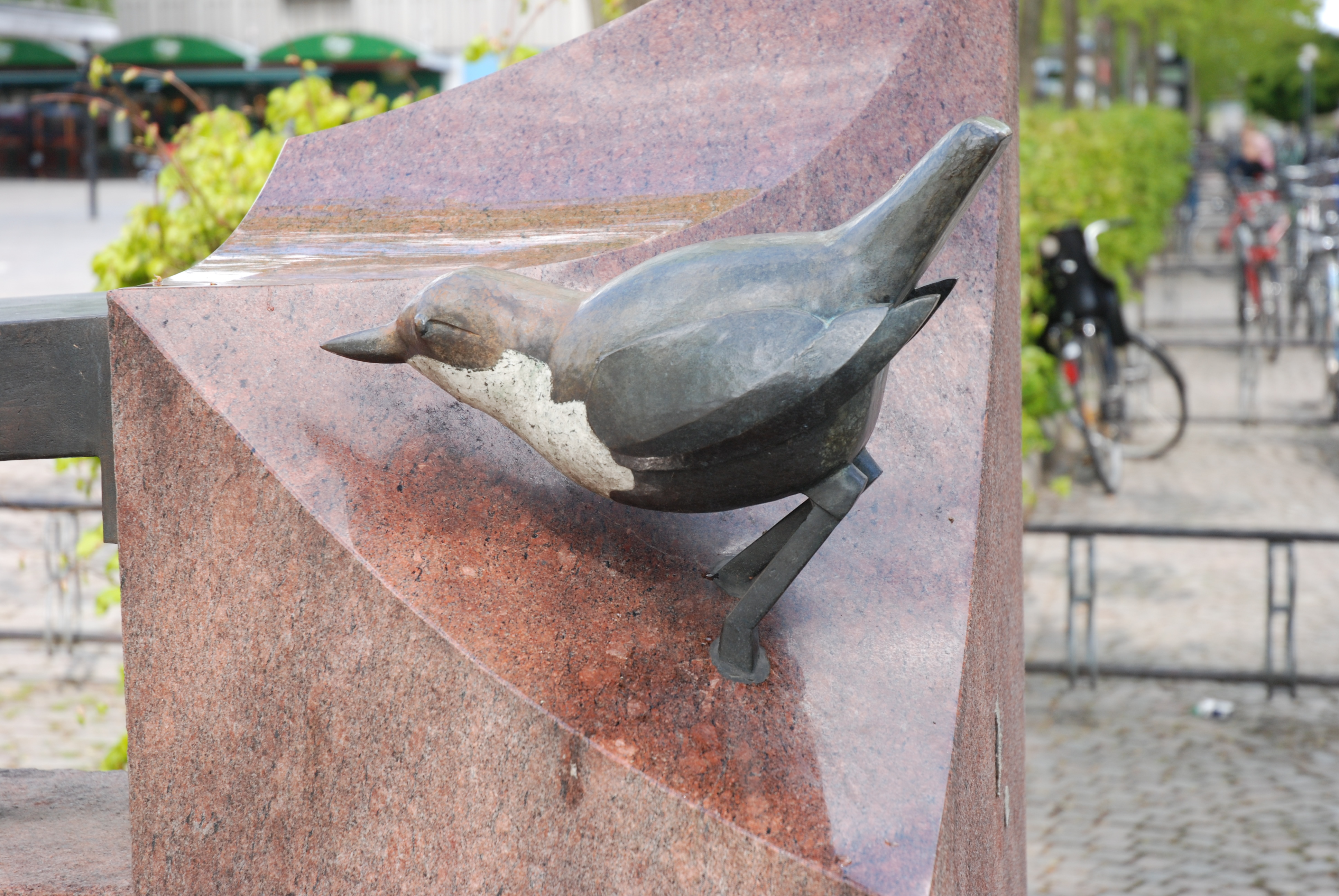 Bengt-Göran Broström´s ASEA-strömmen, Västerås, Sweden (detail)